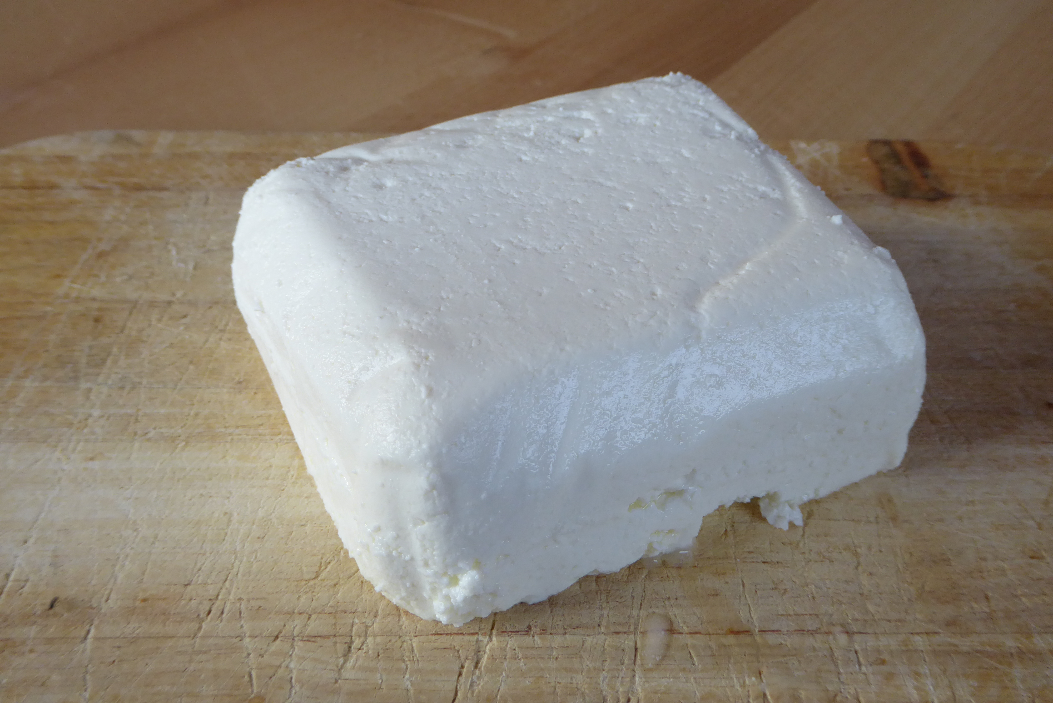 Bloderkäse, hergestellt von einer Toggenburger KäsereiDer Käse hat eine Größe von ca. 11 x 10 x 4,5 cm.